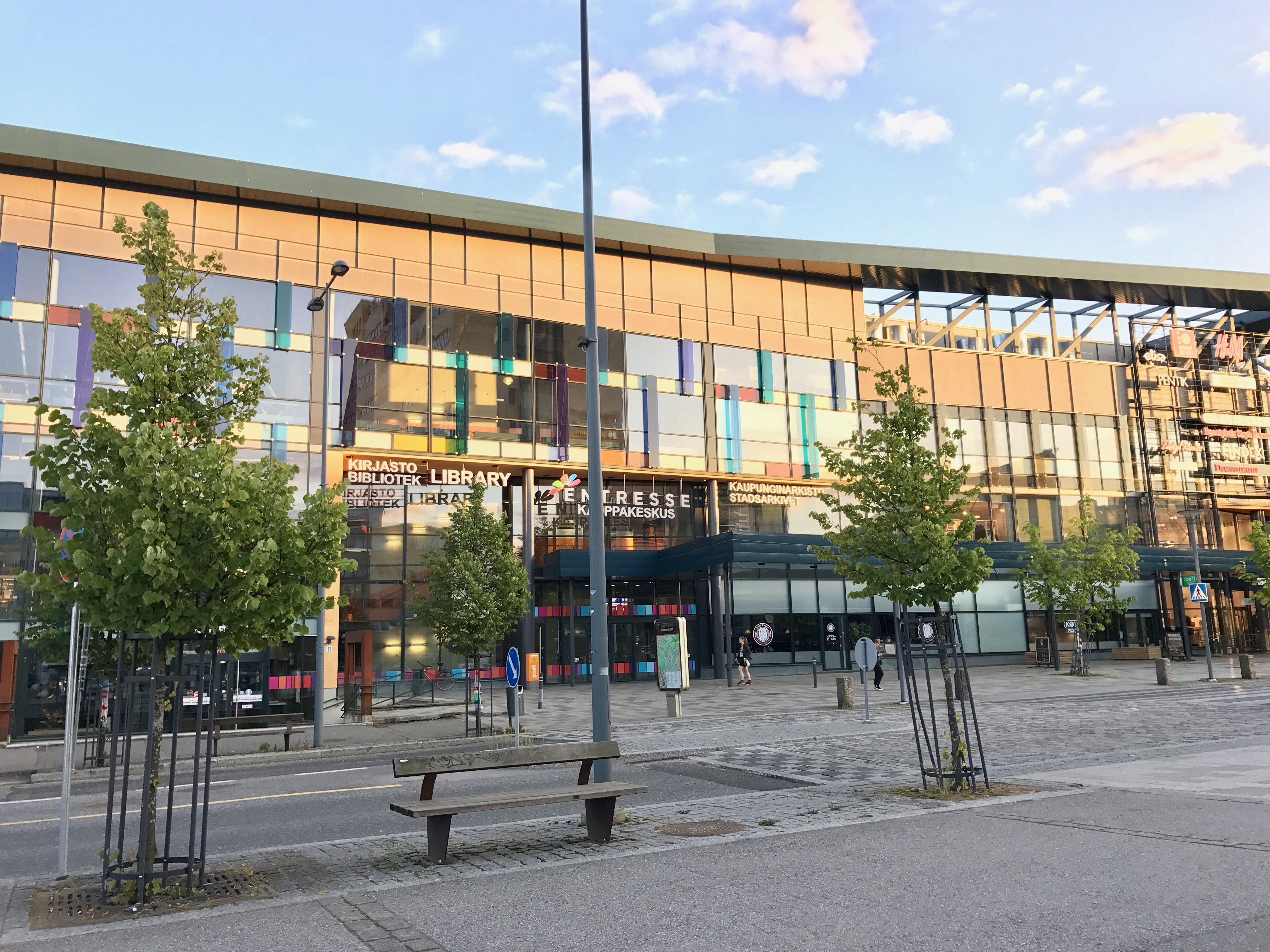 Espoon kaupunginarkisto kauppakeskus Entressessä.